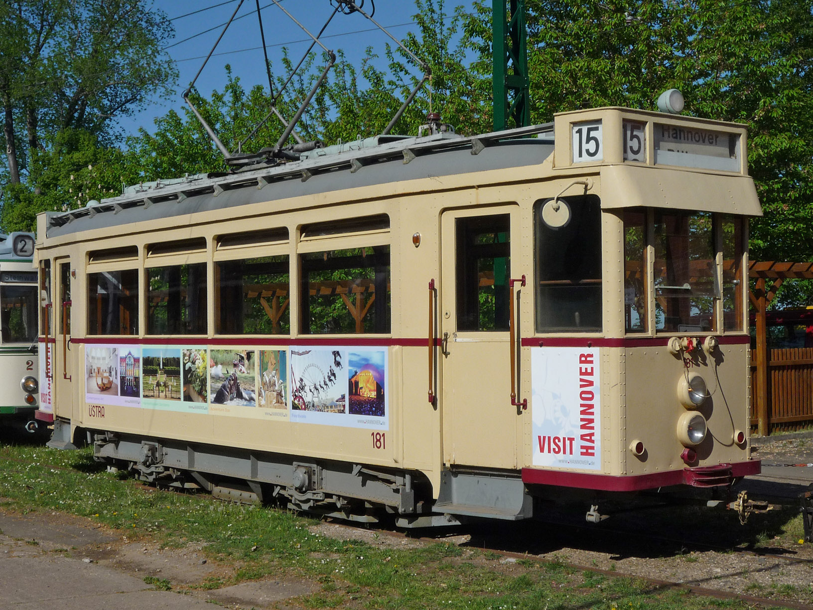 Hannoversches Straßenbahn-Museum in Wehmingen bei Sehnde. Baujahr 1929, Hersteller Hawa, Triebwagen-Nr. 181